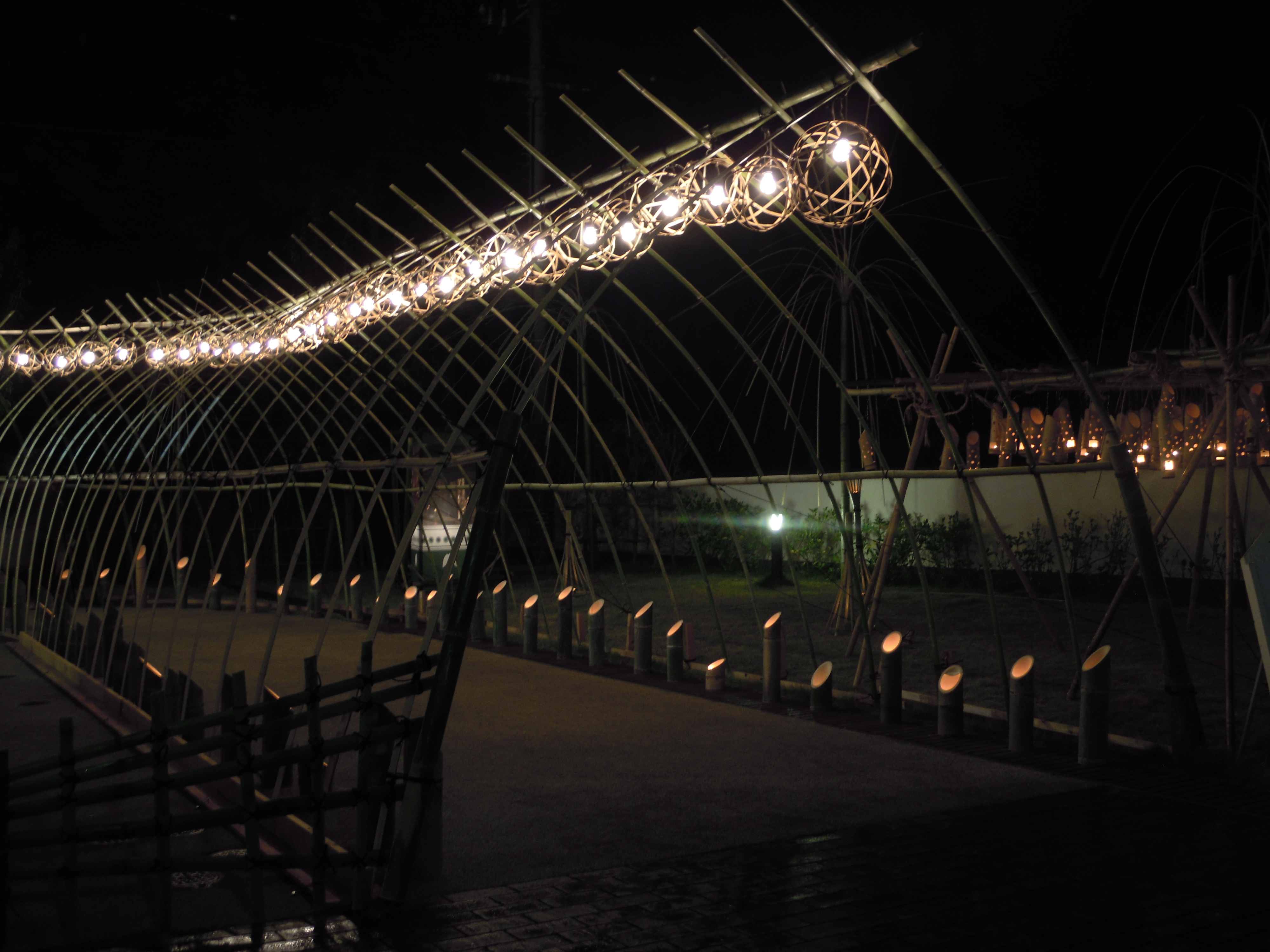 憧憬の道、憧憬広場